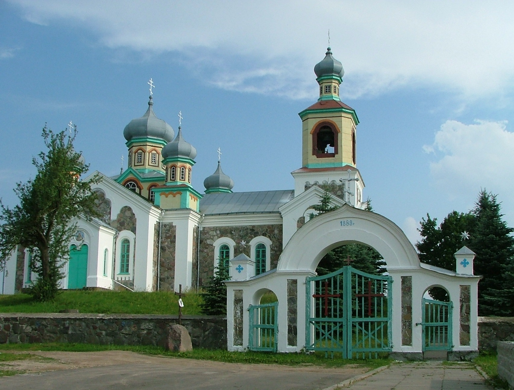 Беларусь, Турец. Церковь Покрова Пресвятой Богородицы